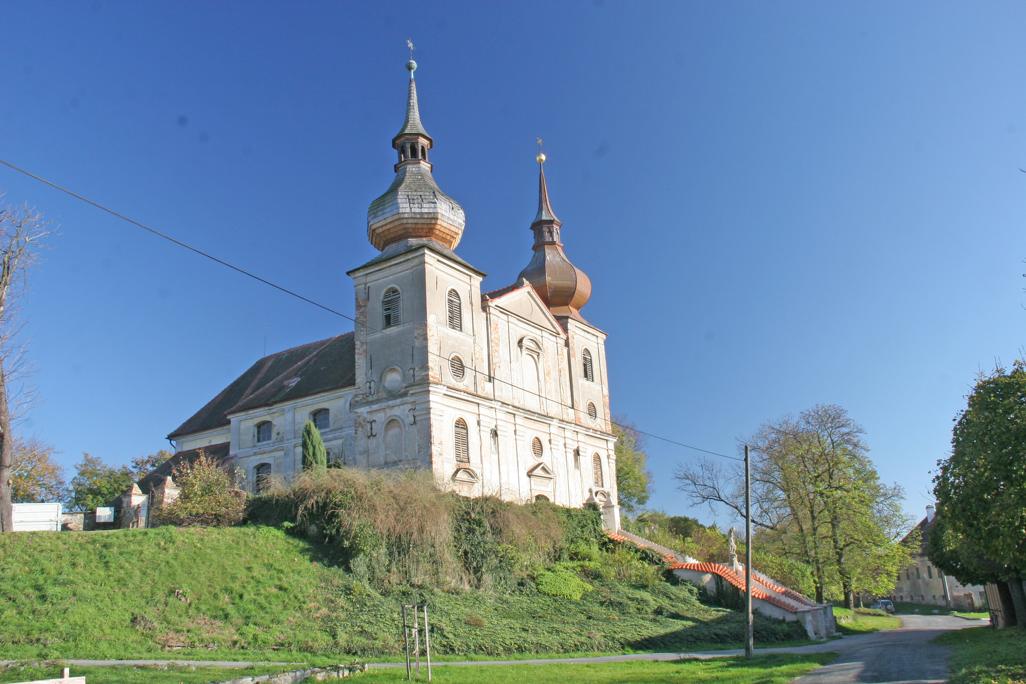 Kostel Nejsvětější Trojice, Zbyslav (Vrdy).